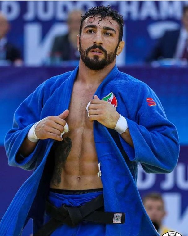 محمد محمدی بریمانلو در مسابقات جهانی ۲۰۱۸ باکو به عنوان نماینده ایران شرکت کرد و به مقام سوم جهان رسید.